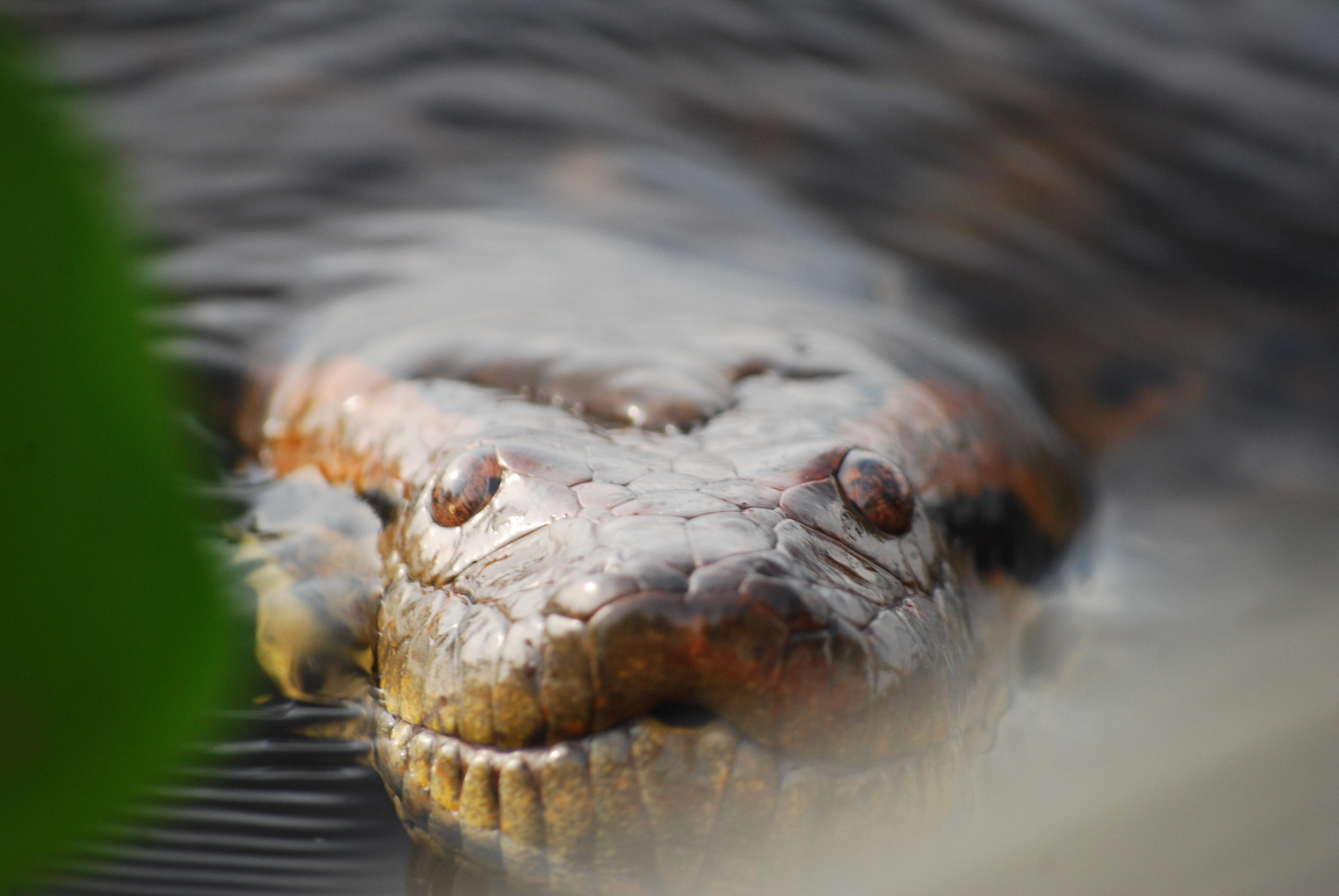 Durante un viaje de observación de fauna en el Estado Apure tuve la suerte de toparme con una gran serpiente Anaconda la cual con una poderosa mirada nos hizo saber que nuestra presencia no era de su agrado